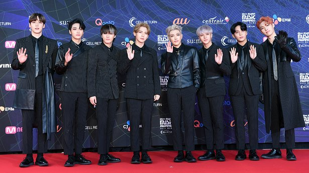 mnet music award red carpet on 201912